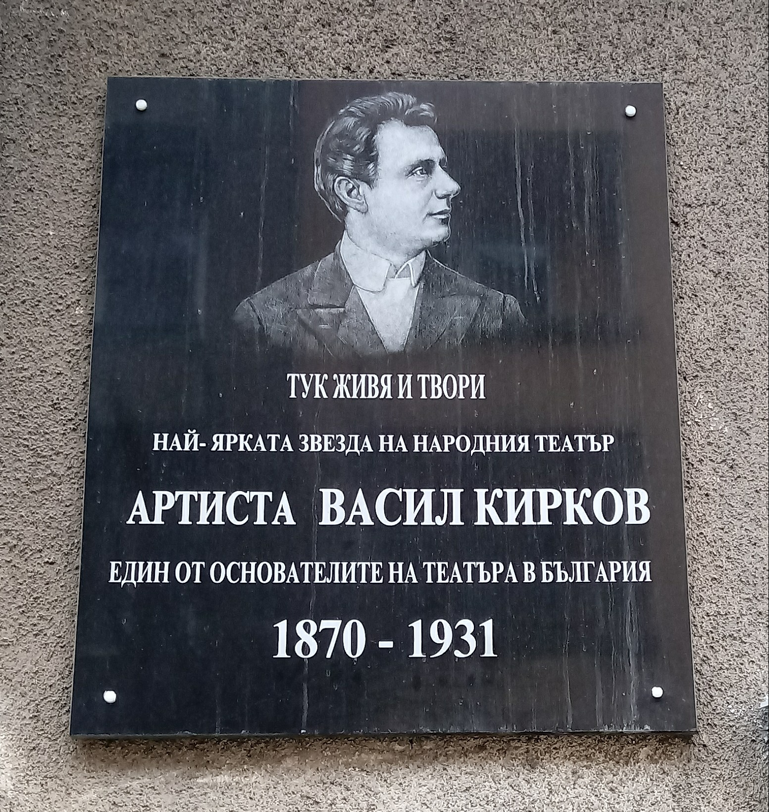 Vasil Kirkov memorial plaque, 26 Parensov Str., Sofia